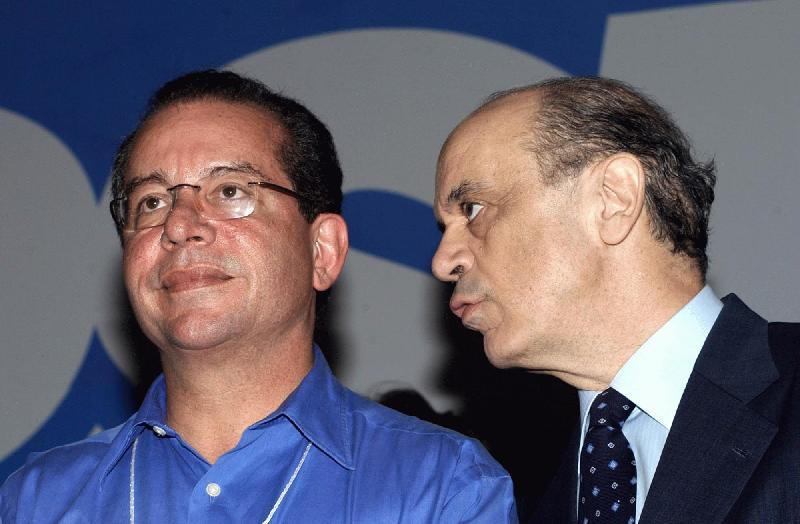 Convenção Nacional do PSDB. Deputado José Aníbal e o ex-senador José Serra conversam.